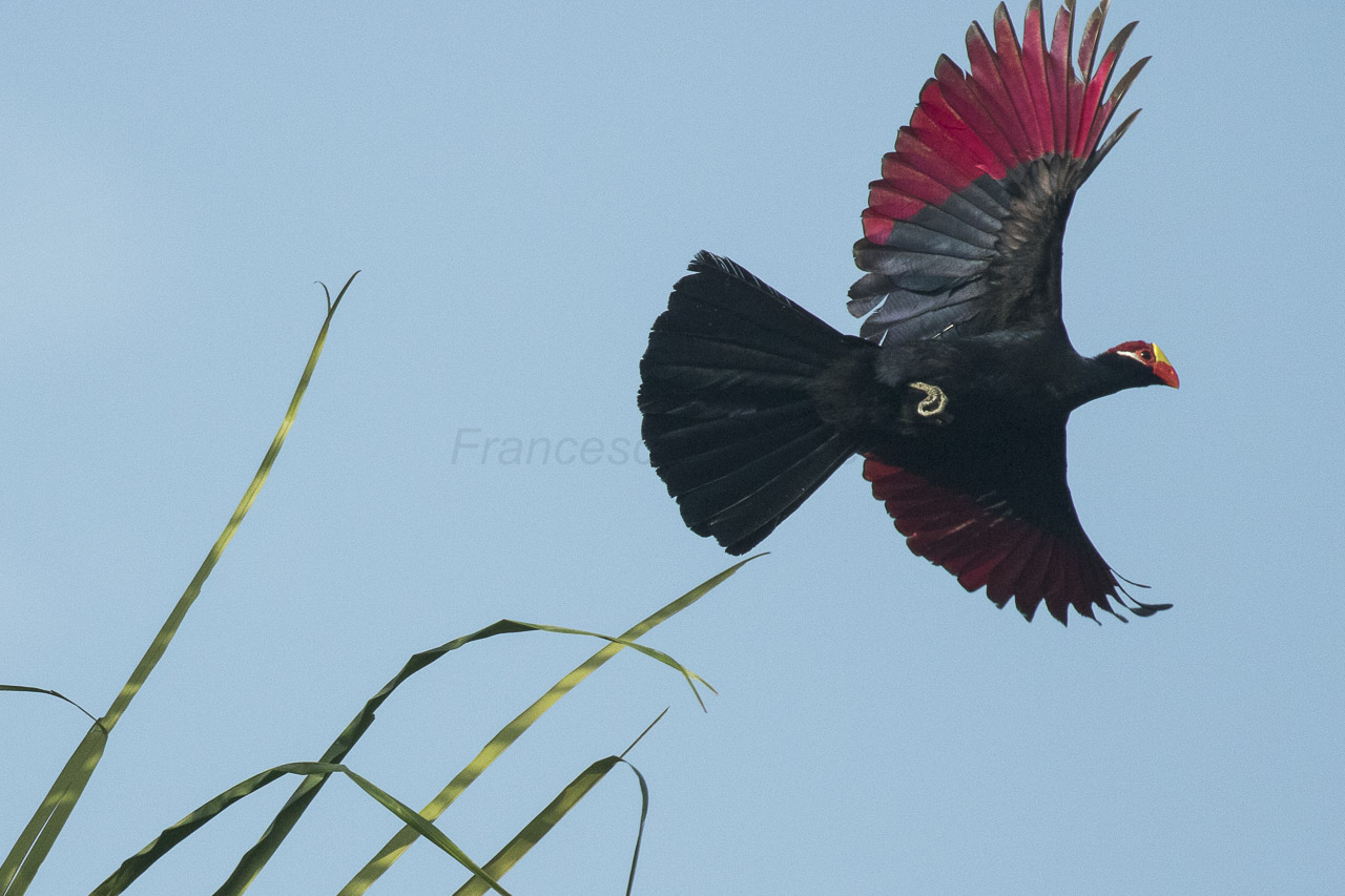 Violet Turaco - Gambia 17_CD5A2671